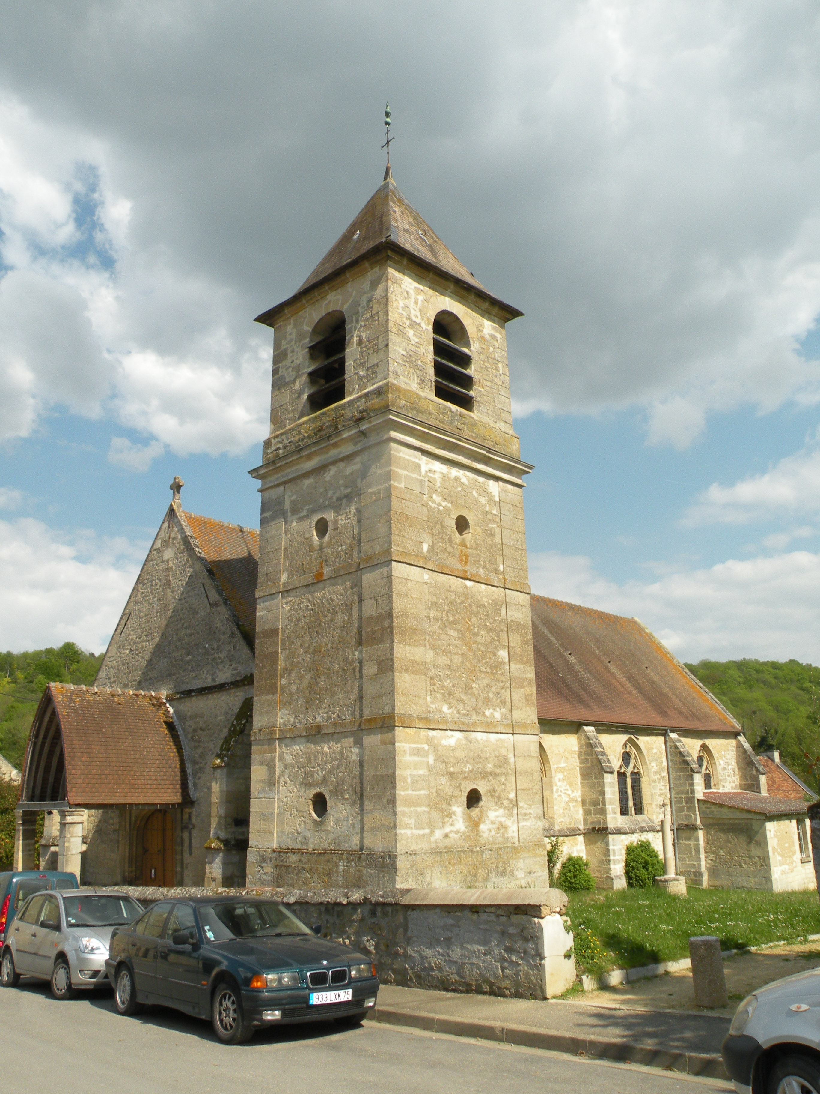 eglise de la commune de Blaincourt-lès-Précy, oise france